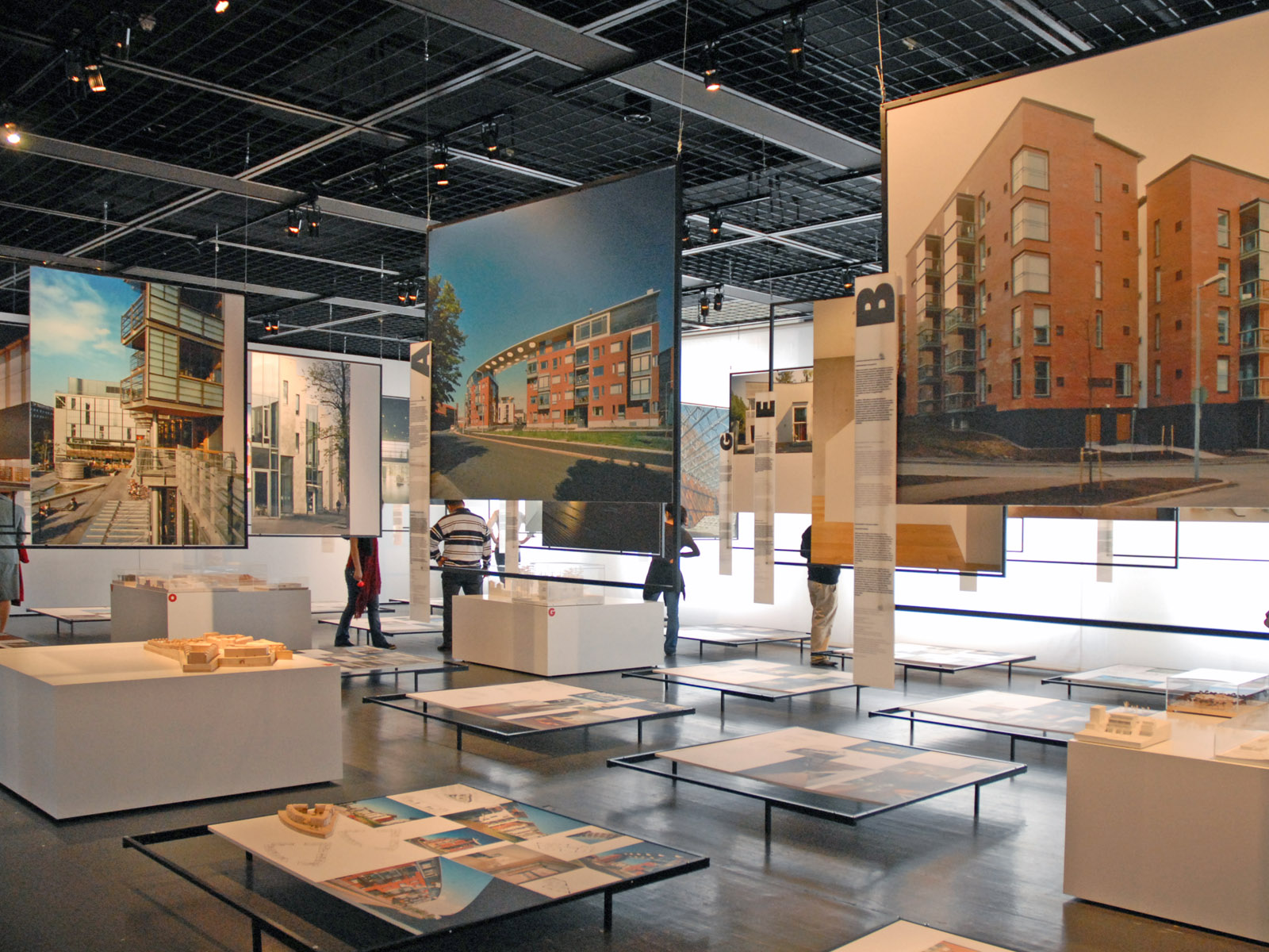 Salle d'exposition sur des réalisations architecturales contemporaines Le musée d'architecture, situé à proximité du musée du design, présente des expositions temporaires sur des réalisations architecturales en Finlande. Il dispose d'une importante bibliothèque, d'un centre d'archives et de maquettes de bâtiments.